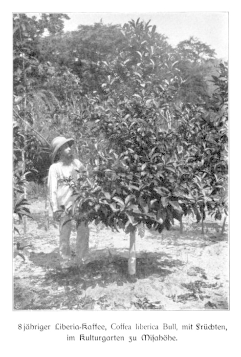 8-jähriger Liberia-Kaffee mit Früchten, im Kulturgarten zu Misahöhe